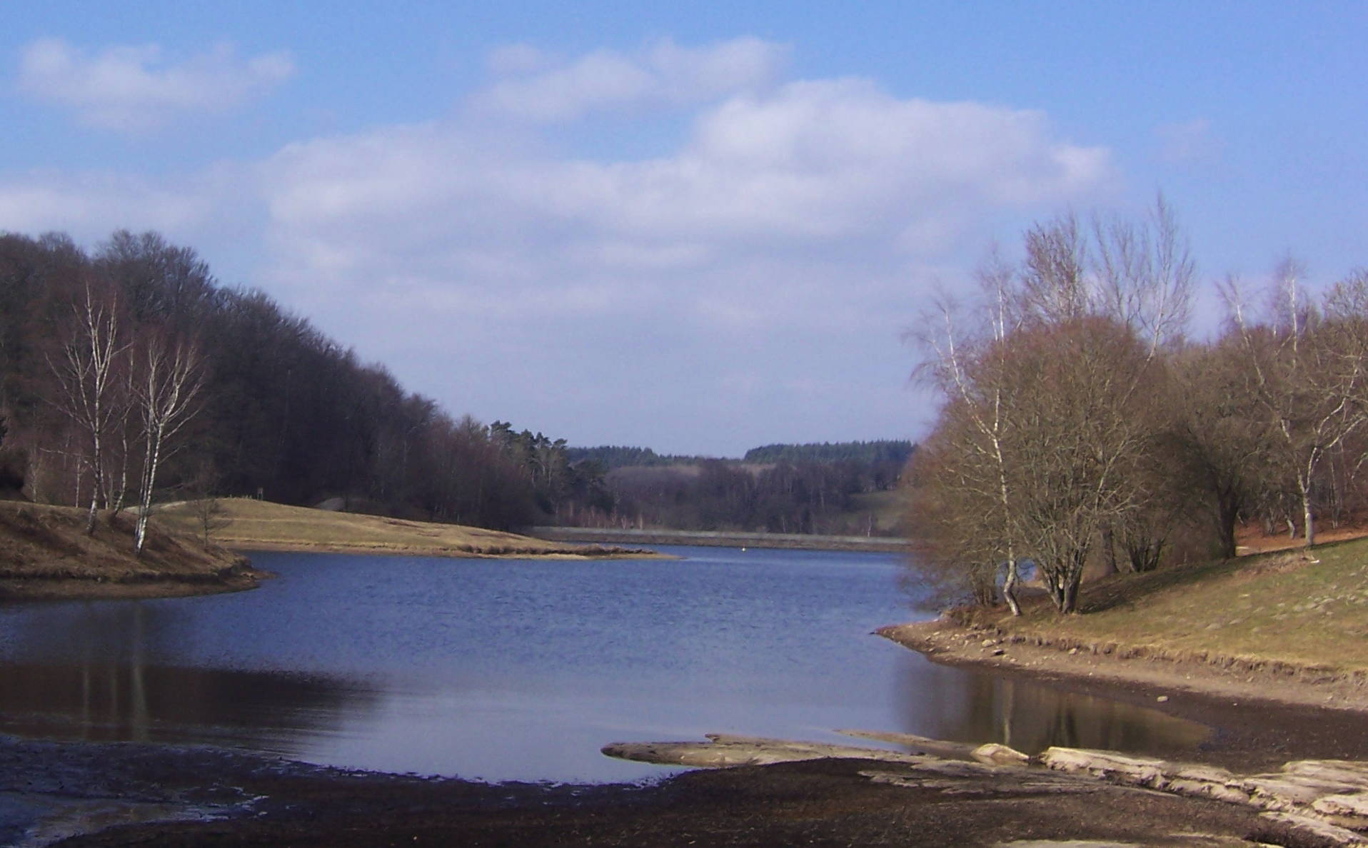 Lac du Tolerme partie au Sud.